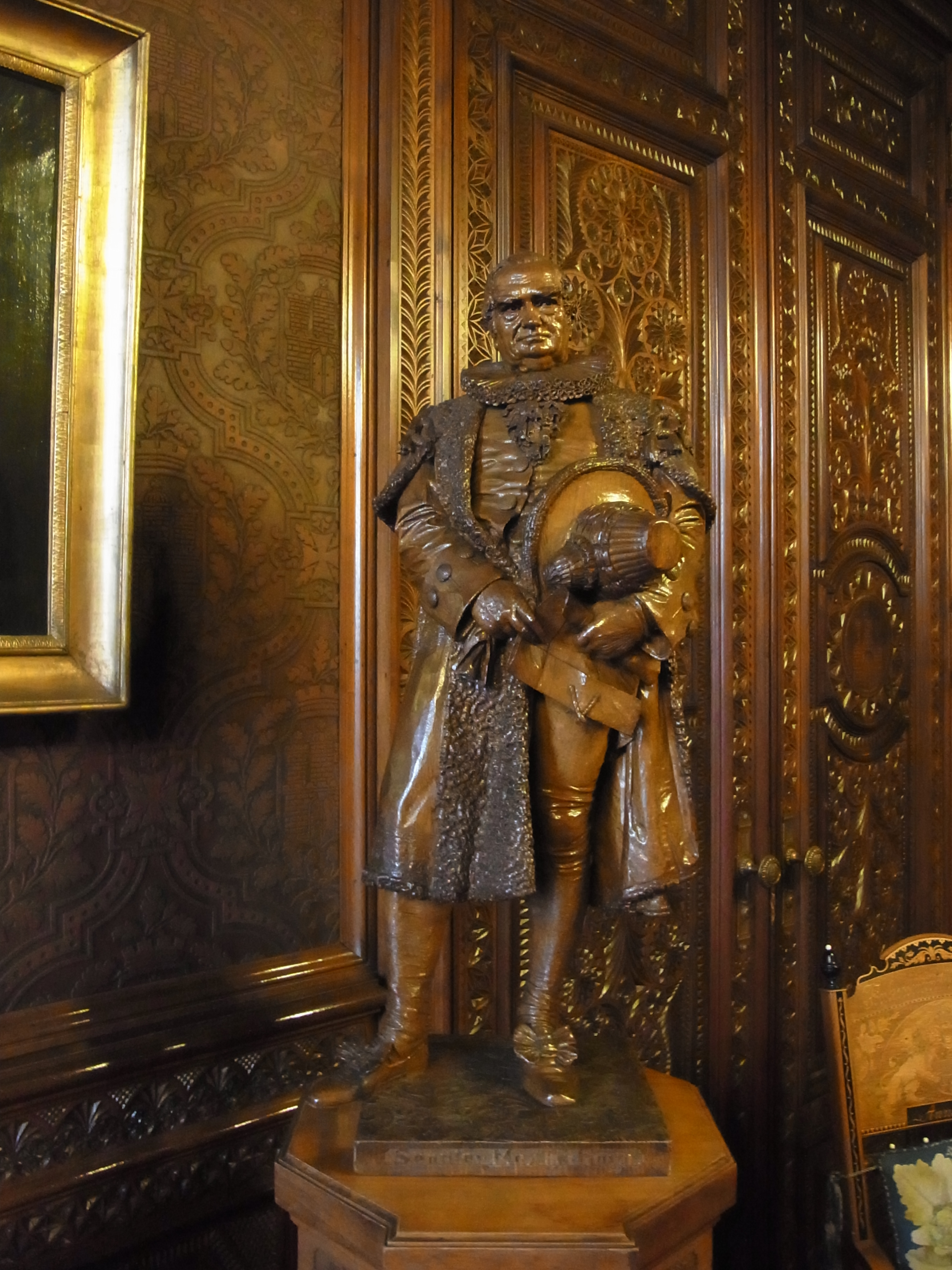 Der Bildhauer Aloys Denoth schnitzte diese 87 cm große Büste im Gedenken an den 1888 verstorbenen Senator Hayn aus einem einzigen Eichenblock. Max Theodor Hayn trägt das volle spanische Ornat der Hamburger Senatoren, er war Schutzherr der Hamburger Waisenhäuser.